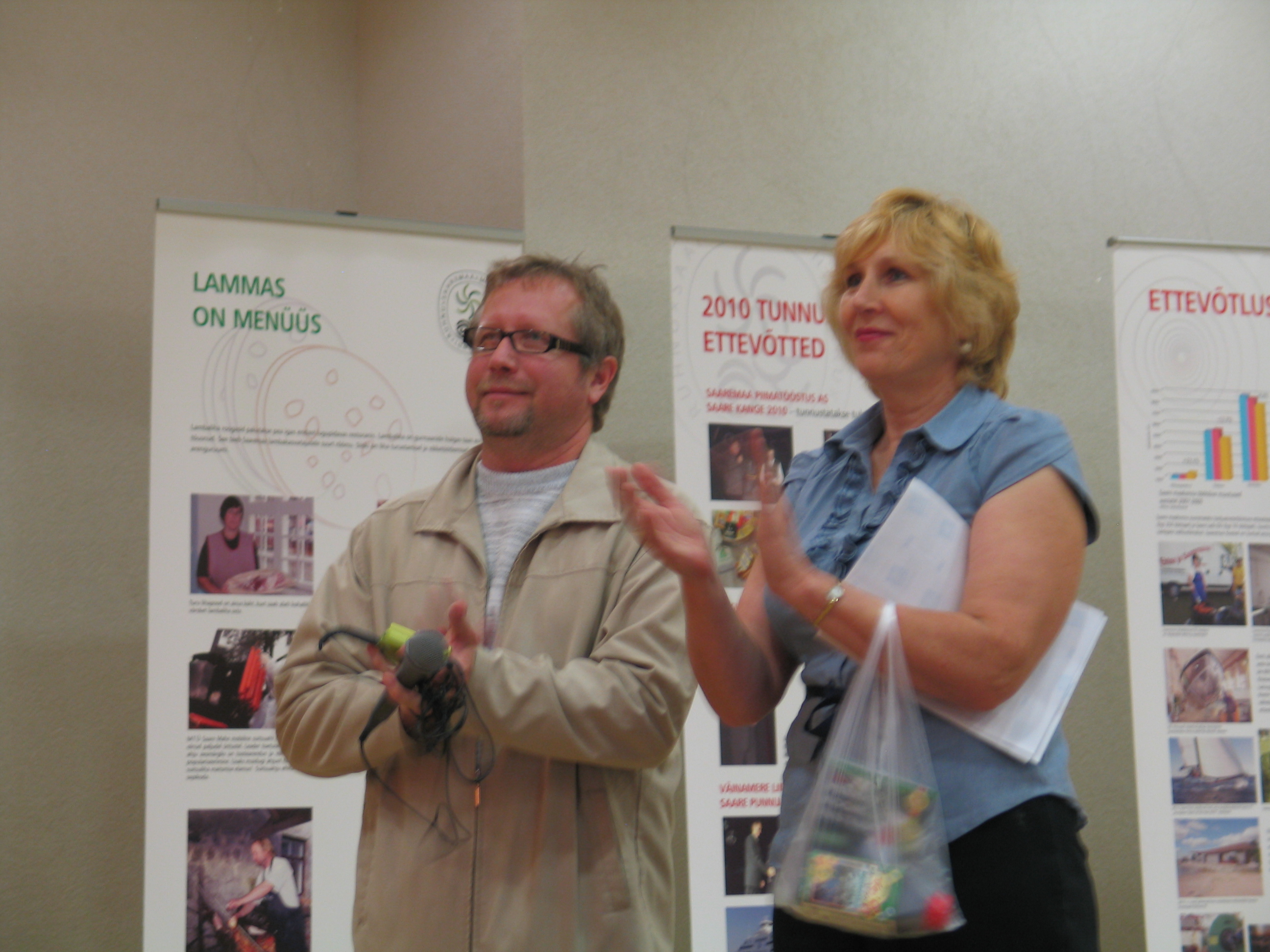 Tõnis Kipper ja Reet Truuväärt Saaremaa ettevõtlusmessil SaareMaaPäevad 2011